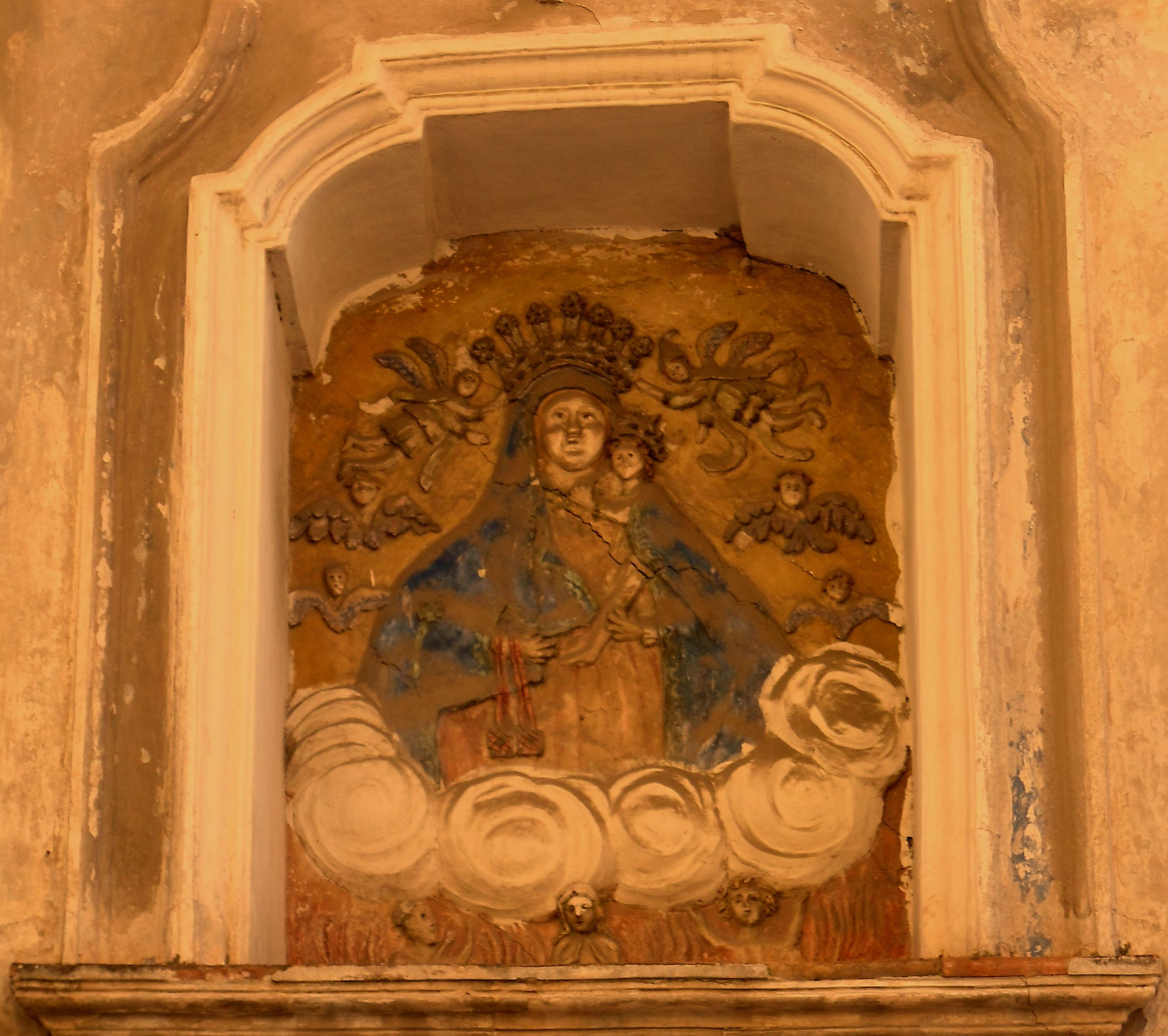 Un'edicola votiva dedicata alla Madonna del Carmine, a Boscotrecase, nella città metropolitana di Napoli.